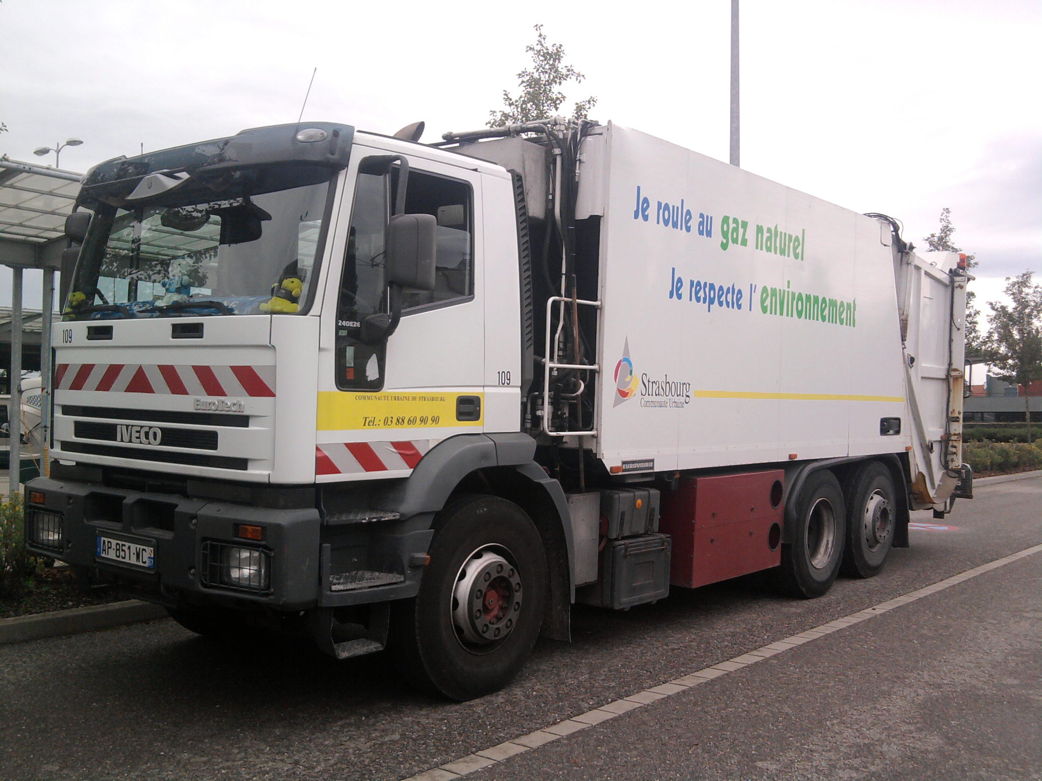 Camion Poubelle IVECO Eurotech à propulsion gaz Naturel, avec benne de marque Eurovoirie